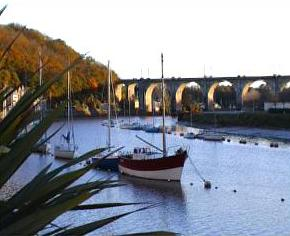 Le viaduc d'Hennebont, où passe le traffic ferroviaire